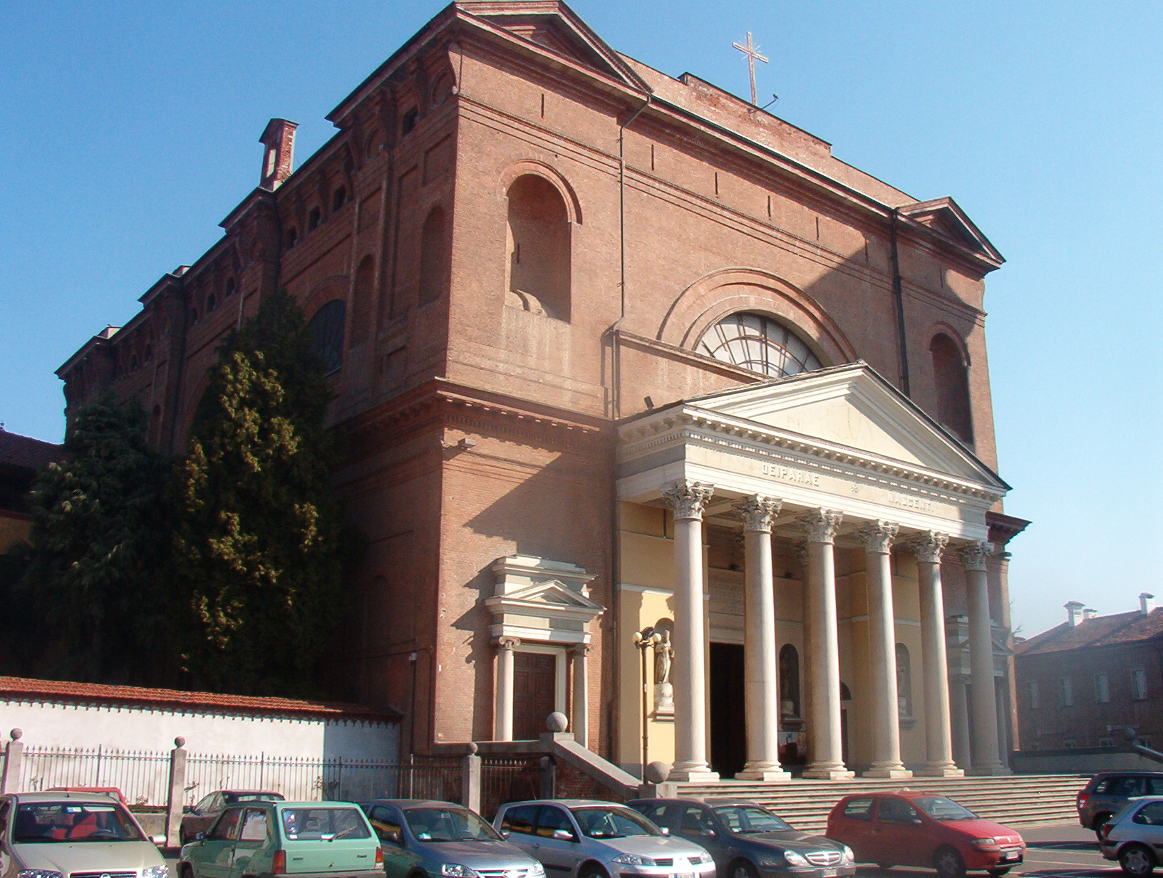 Santa Maria del Borgo - Vigone - Provincia di Torino - Piemonte - Italia